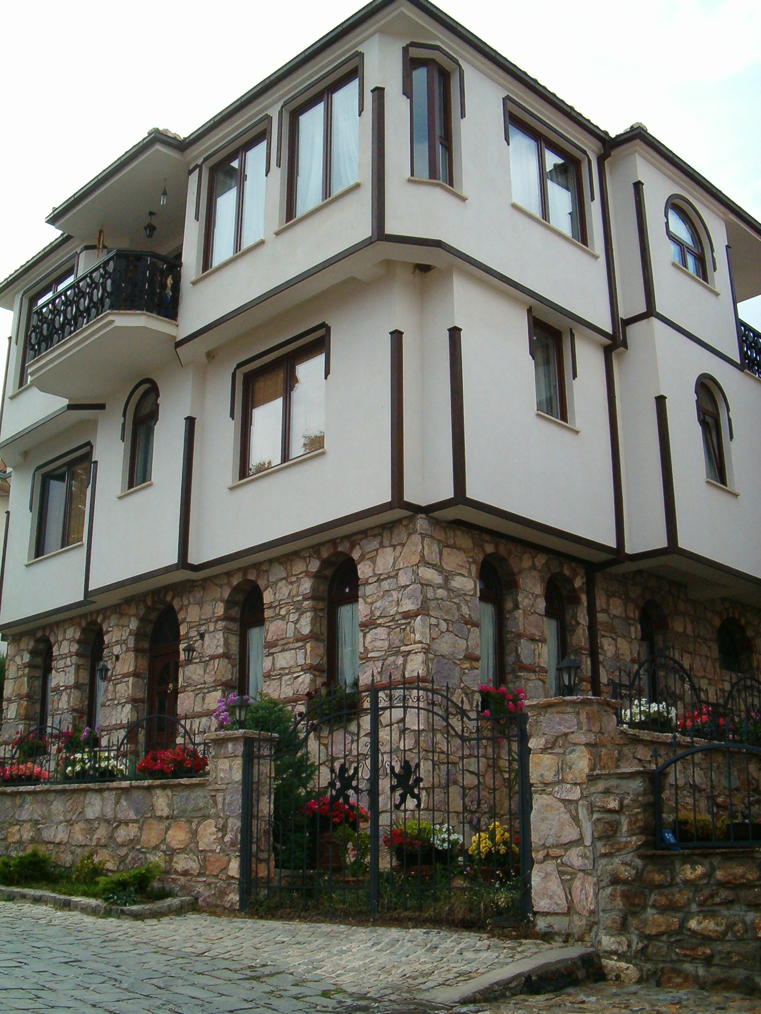 Klasicna makedonska hisa v satrem Ohridskem mestnem jedru.Hisa se nahaja na Plaosniku po gradom.